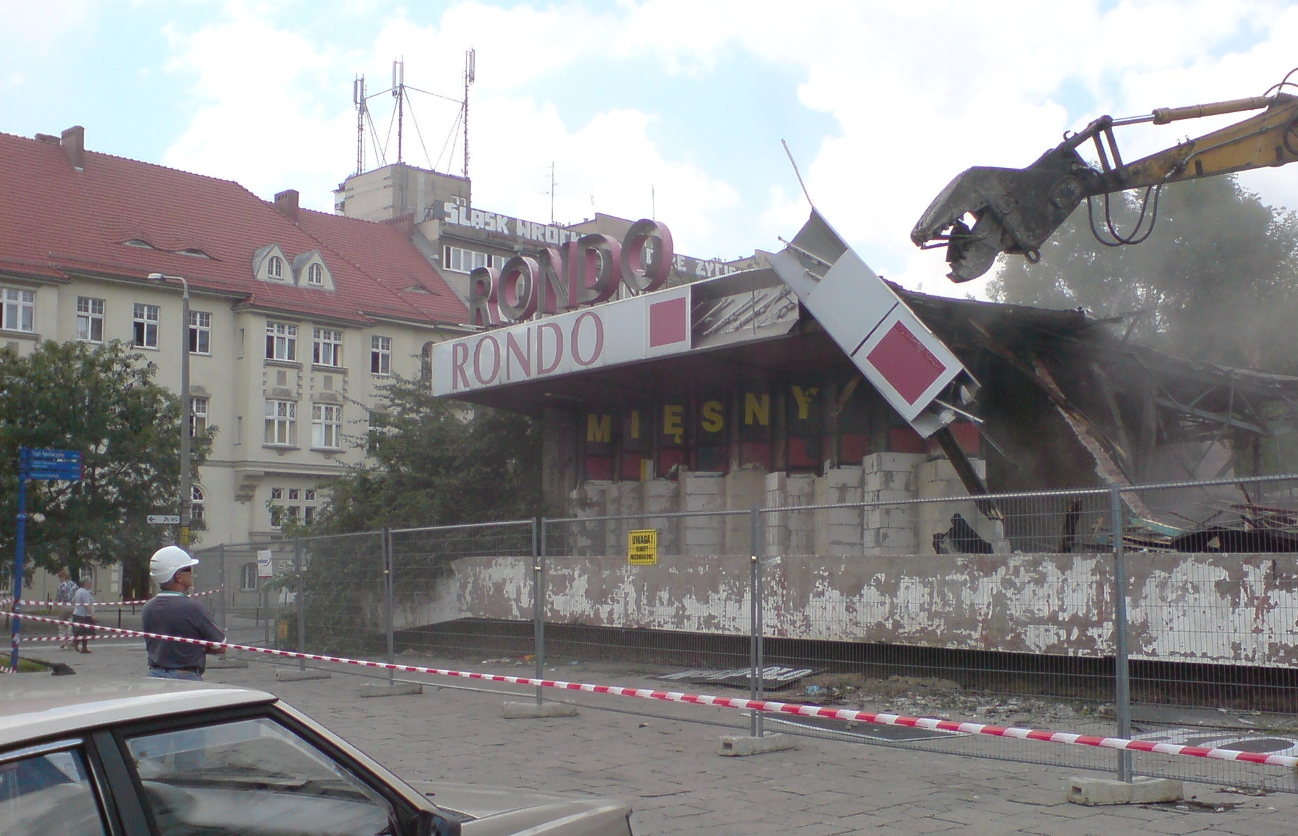 Likwidacja pawilonu "Rondo" przy pl. Powstańców Śląskich 1/3 we Wrocławiu w głębi ul. Zaporoska